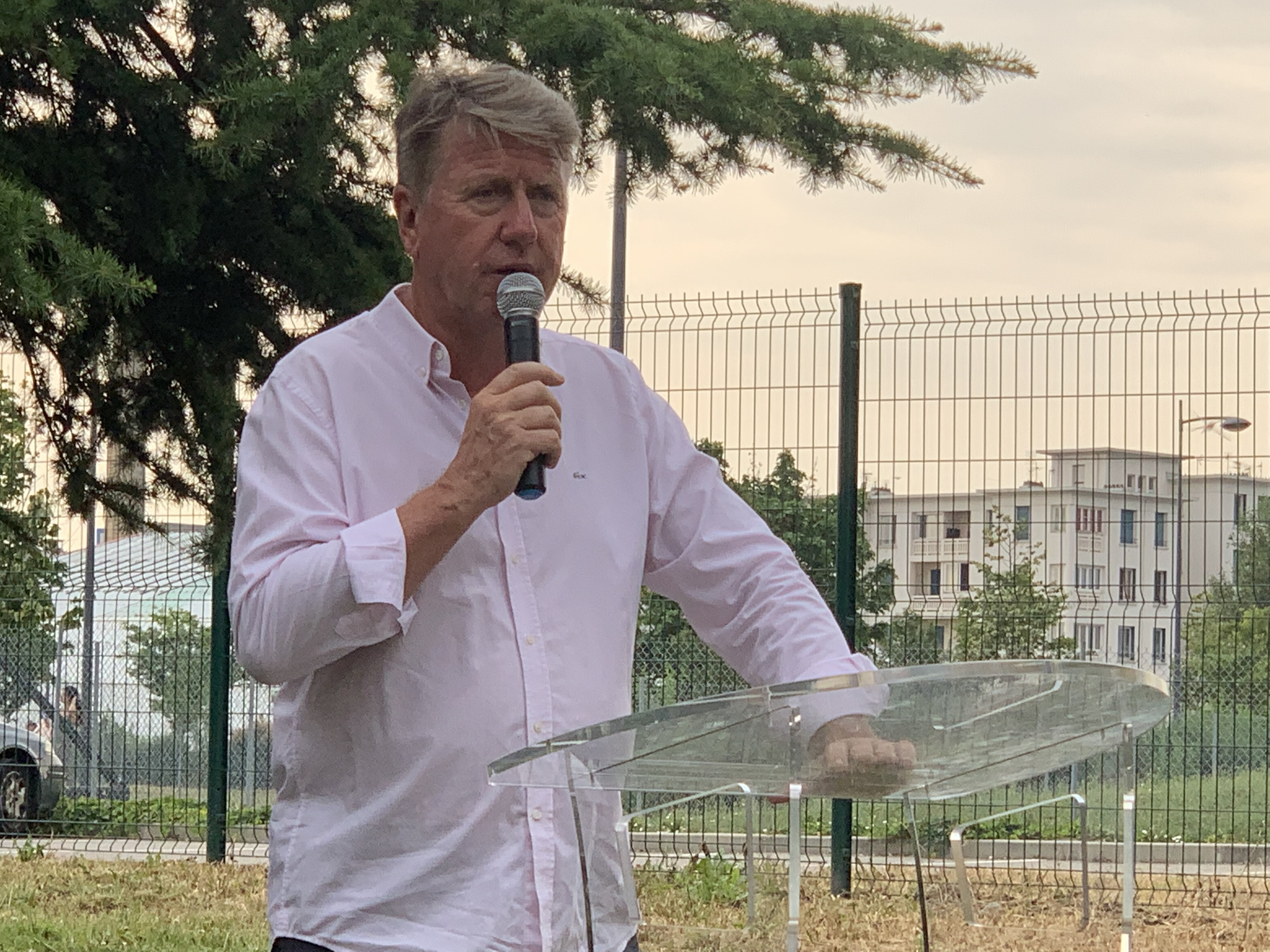 Inauguration nouveau bâtiment Stade du Forum (Ain Sud Foot) 6 juillet 2019.